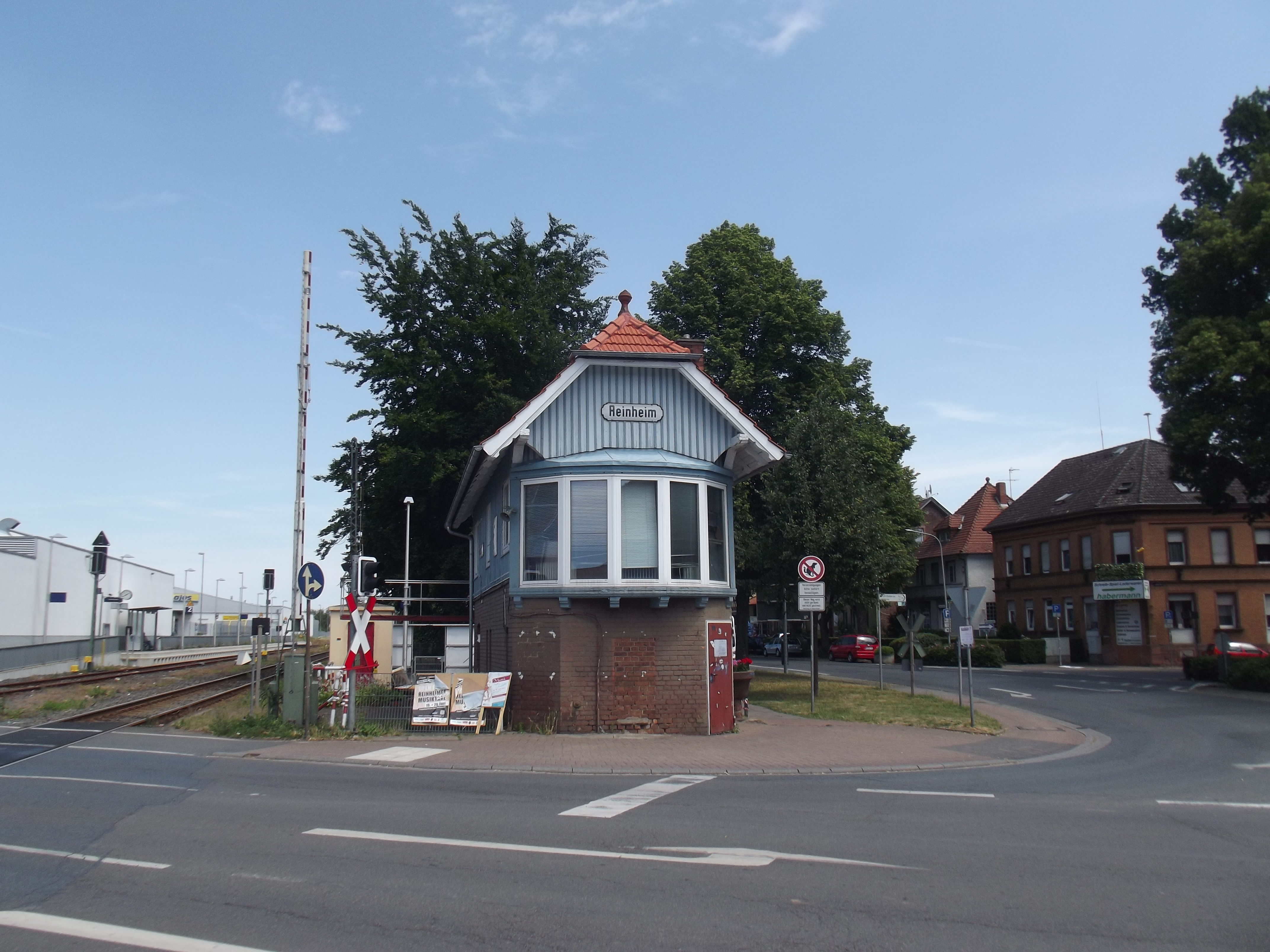 Het station van Reinheim in Hesse met seinhuis